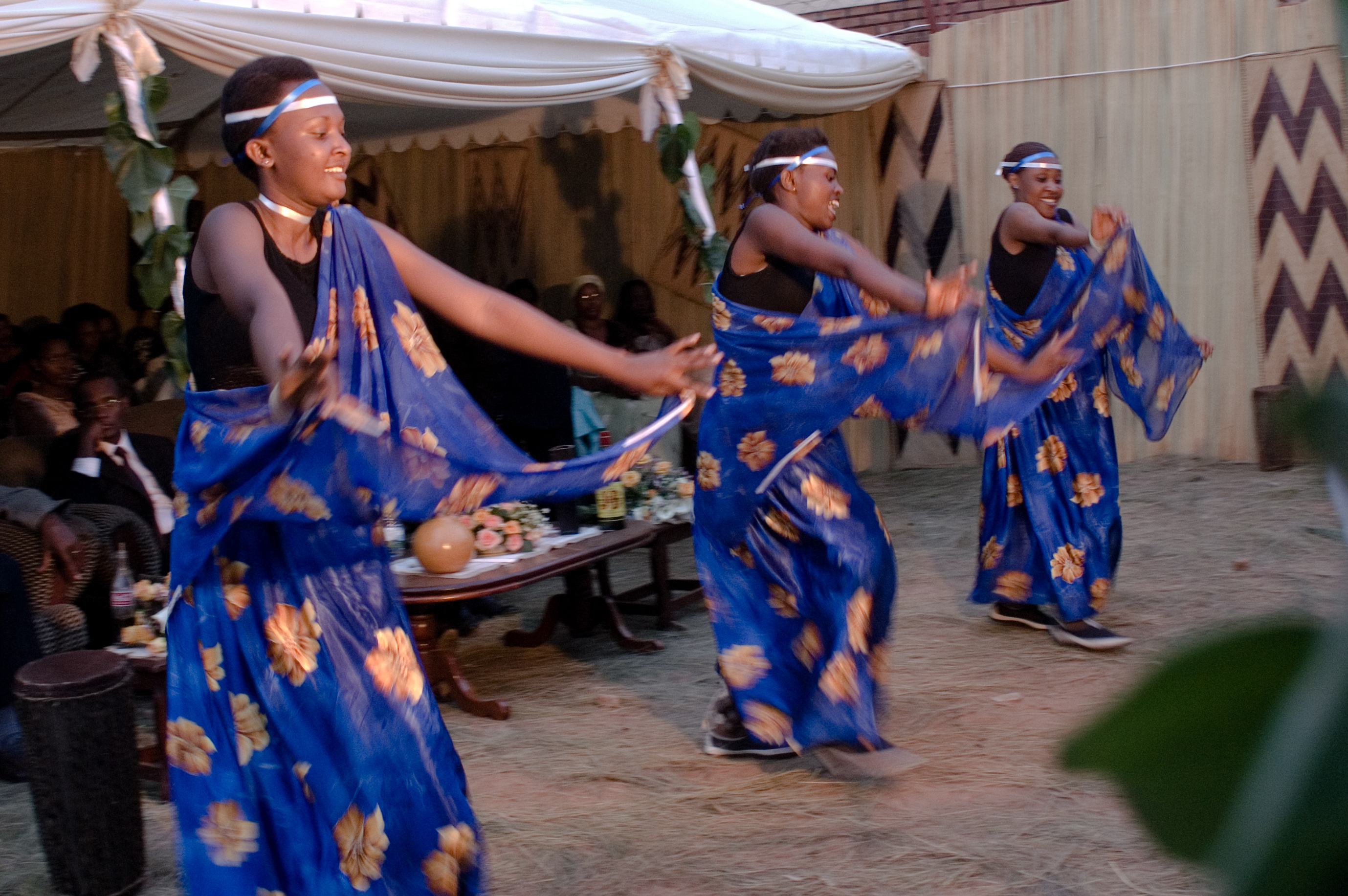 Rwandan dancers